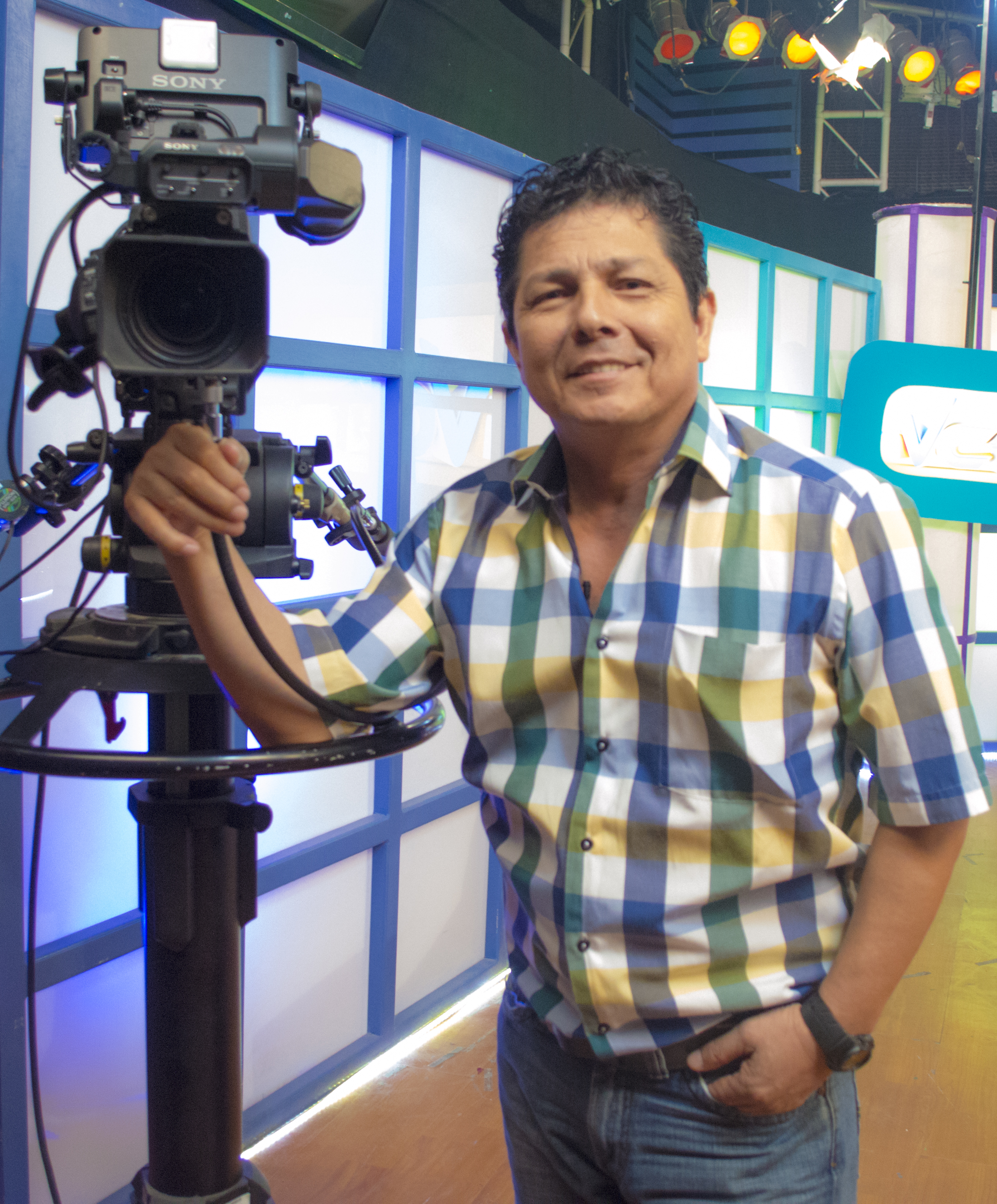 Oswaldo Segura, actor de teatro y de televisión y presentador de televisión en el programa de farándula Vamos Con Todo de RTS el 28 de octubre de 2014.